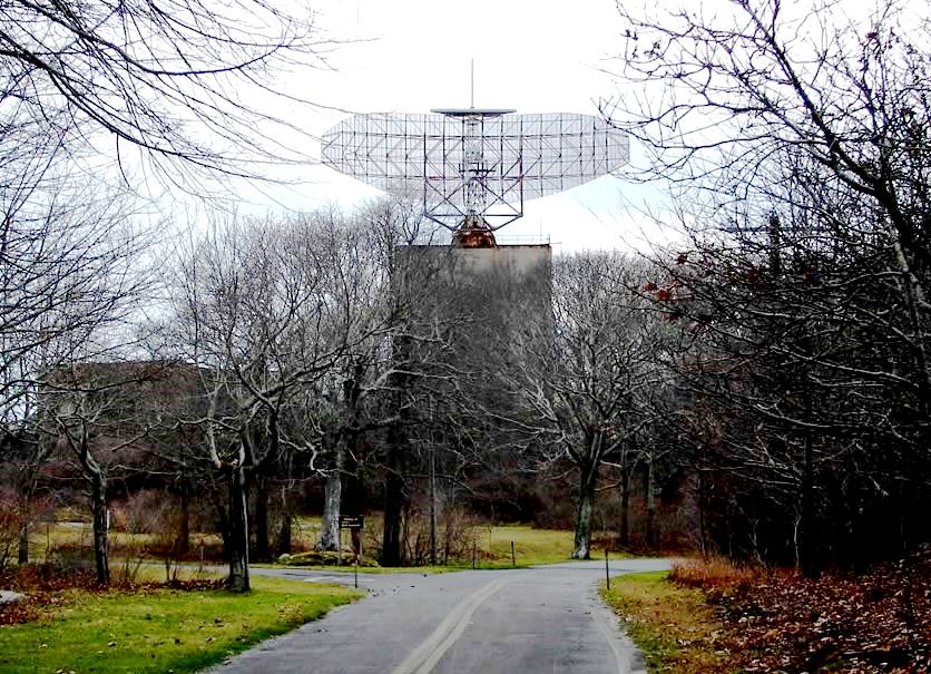 AN/FPS-35 radar dish at Camp Hero State Park, Montauk, NY.